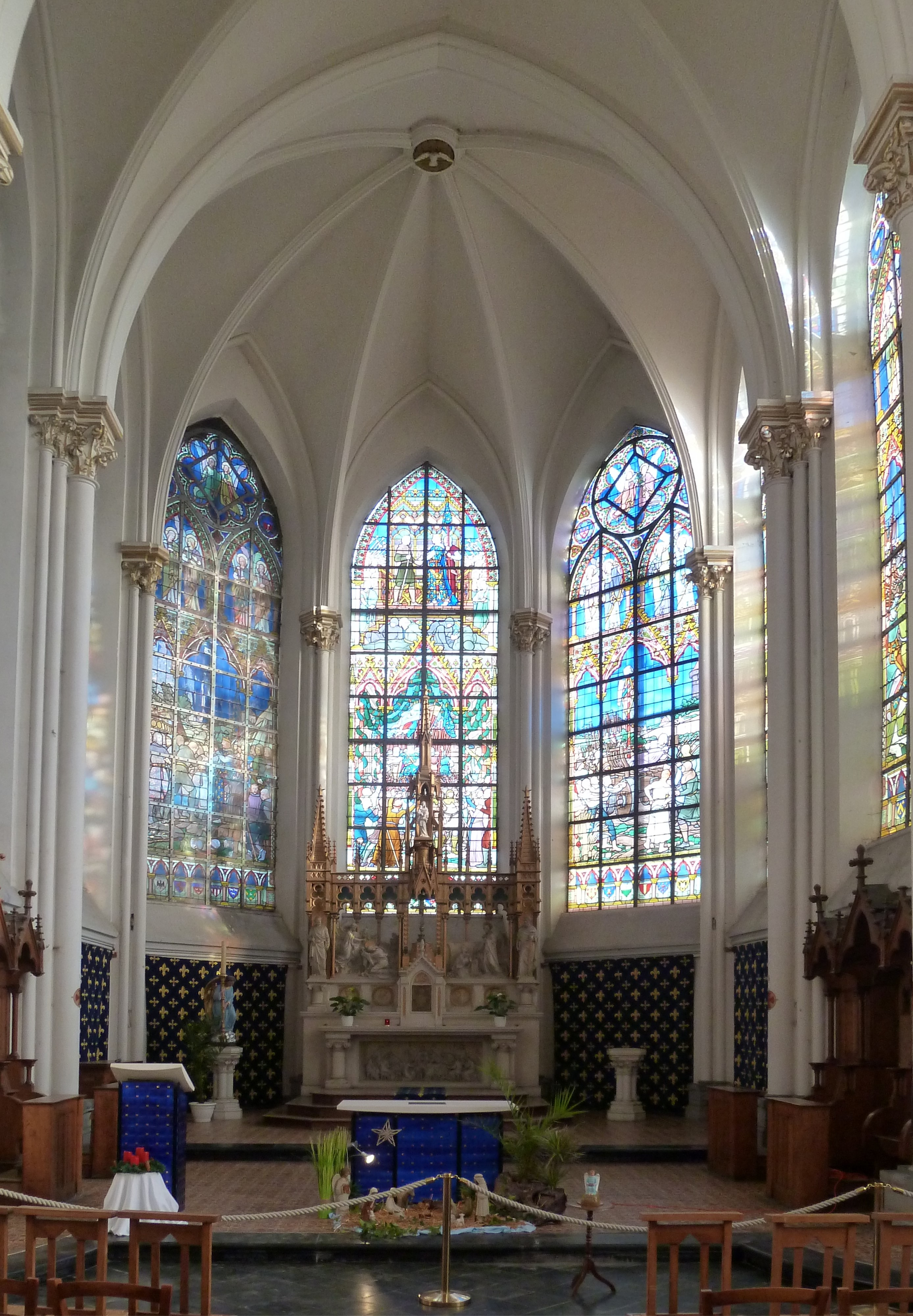 Vitraux du chœur de l'église Saint Pierre retraçant la bataille de Bouvines en 1214. Bouvines, Nord.-Nord-Pas-de-Calais - Vitrail de gauche: Le roi Philippe Auguste libère ses prisonniers sauf Ferrand et Renaud. - Vitrail du maître-autel:L'armée victorieuse entre dans Paris, acclamée par la foule. - Vitrail de droite: L'armée victorieuse sillonne les campagnes, Ferrand est la risée des paysans. .